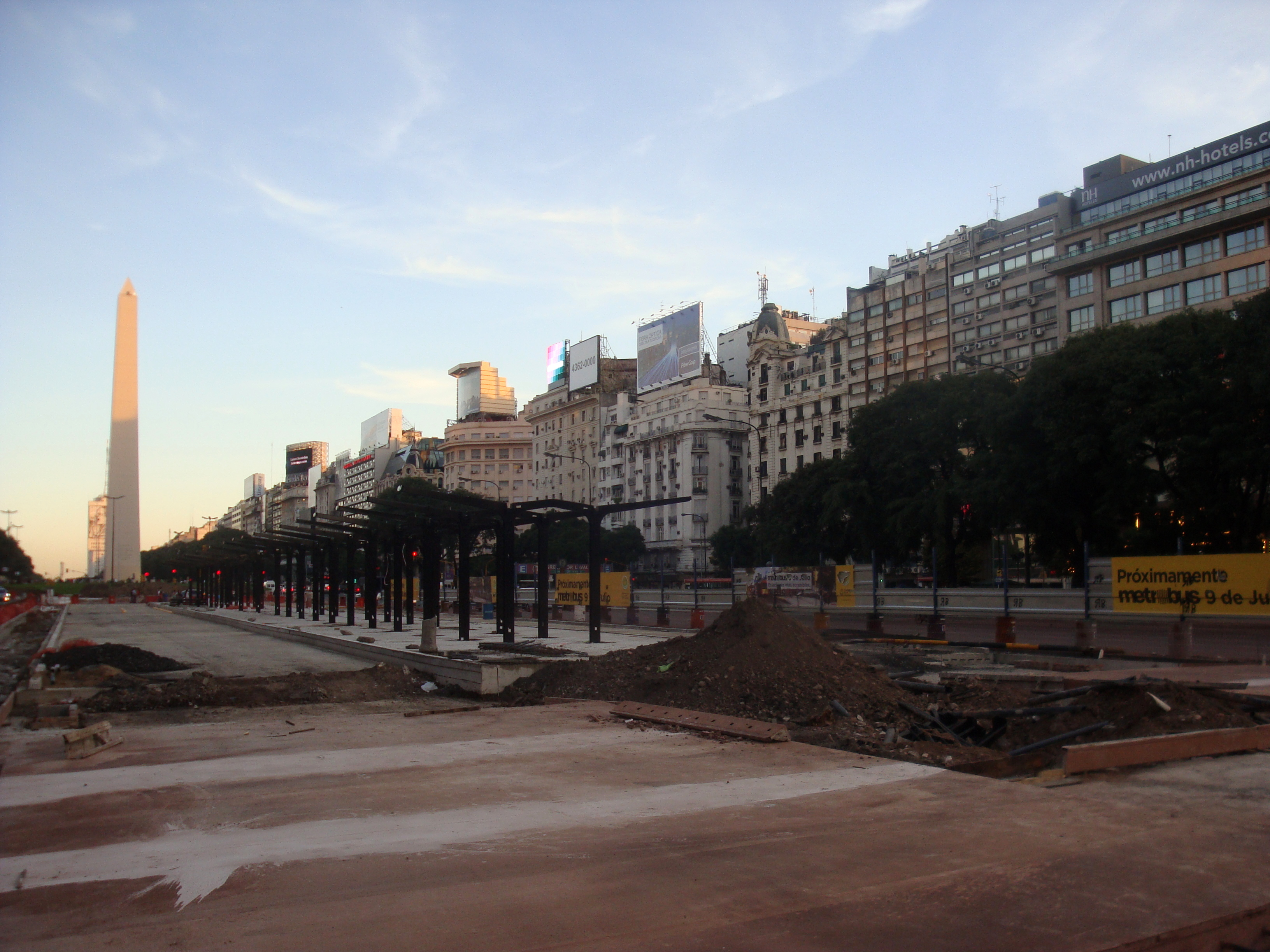 Obras de ampliación del Metrobus sobre la avenida 9 de Julio, Buenos Aires.